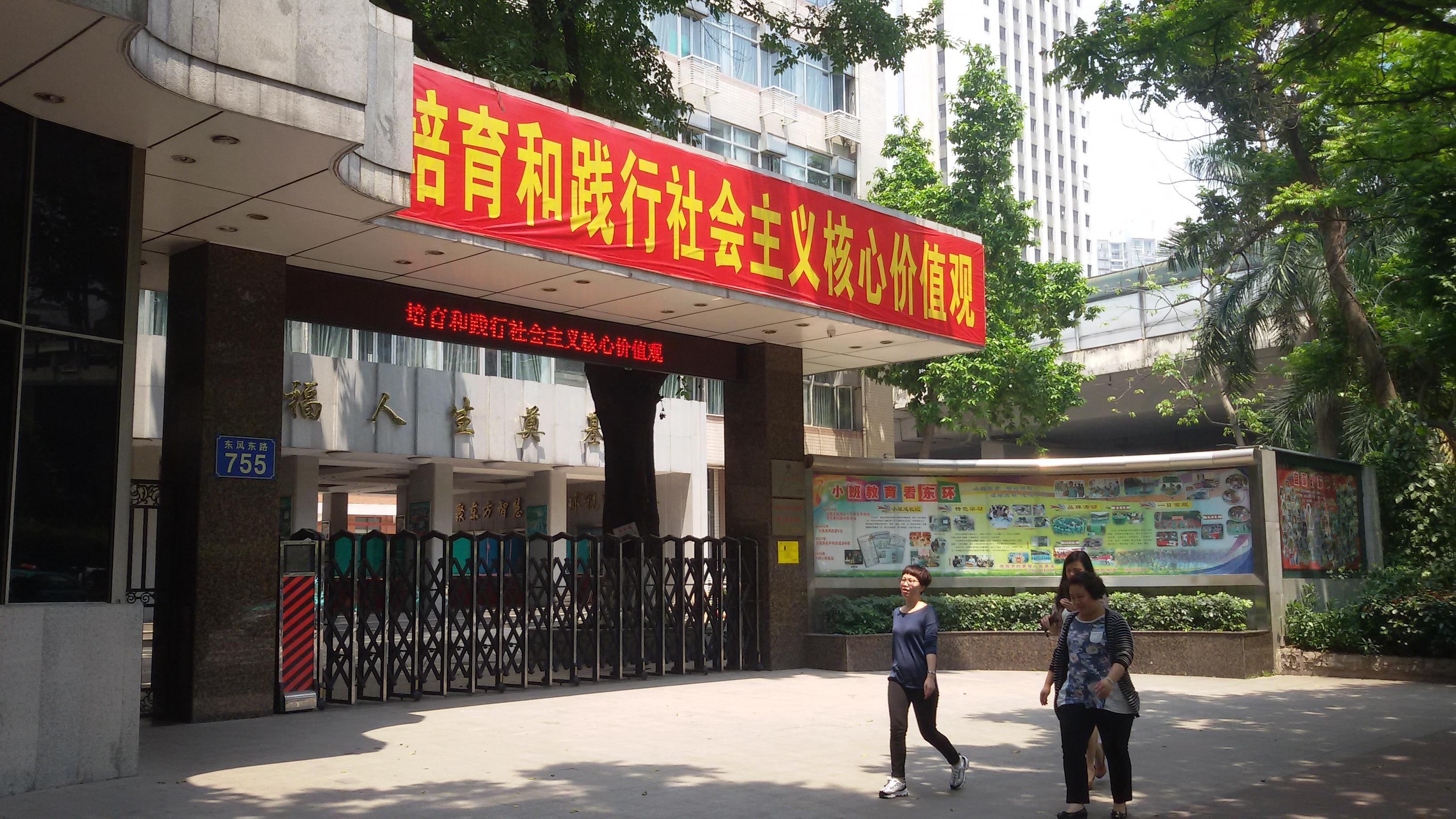 粵語: 广州市东环中学